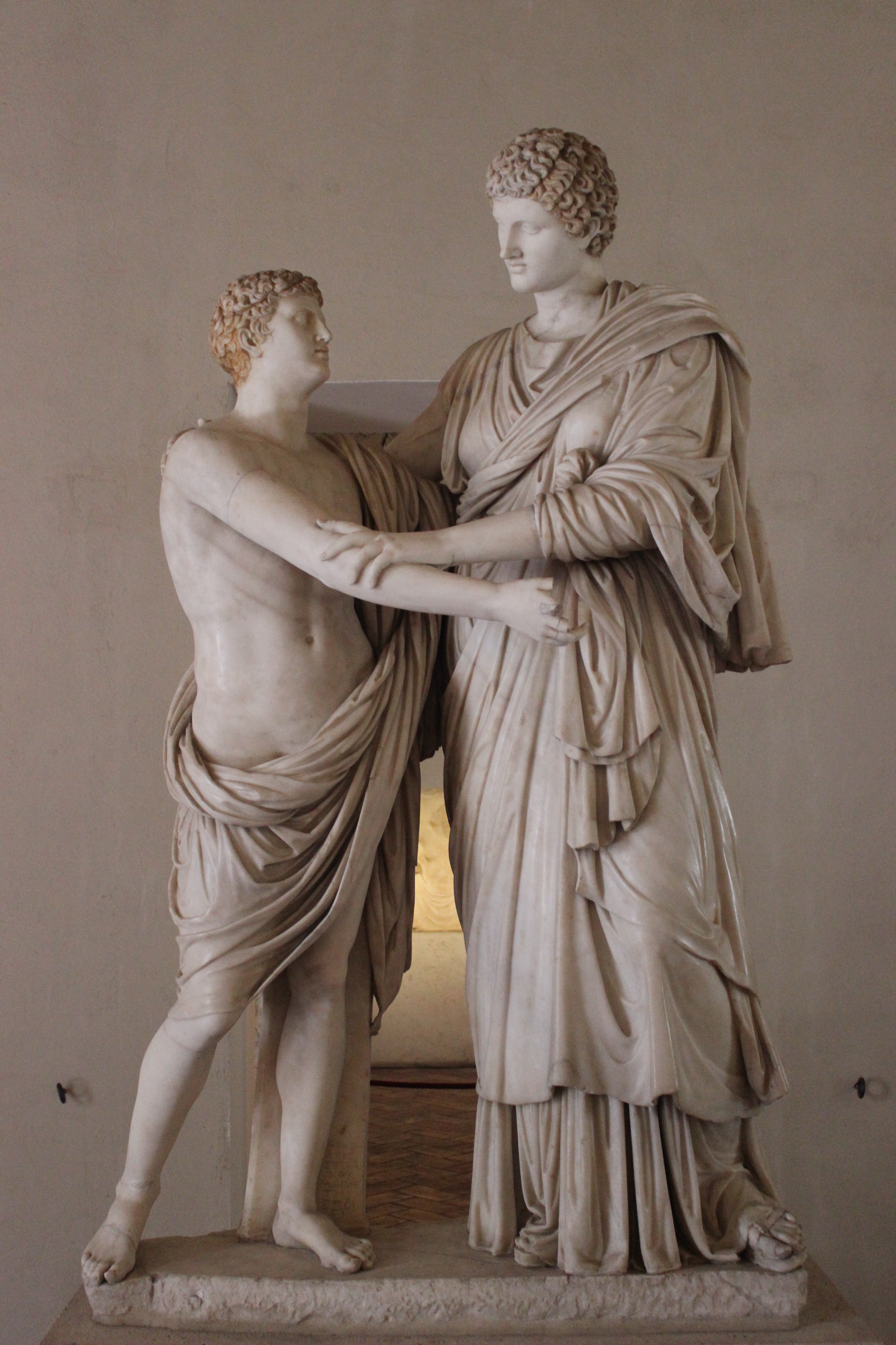 Roma. Palazzo Altemps. Orestes y Electra por Menelaos.